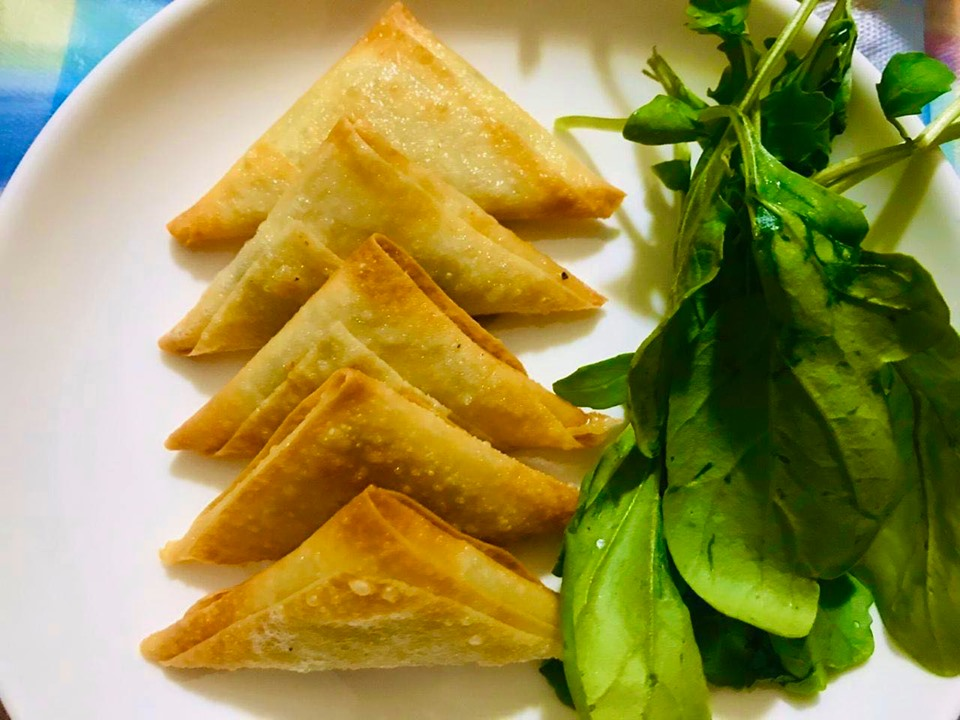 صورة لطبق سمبوسك مصنوعة من الجبنة العربية